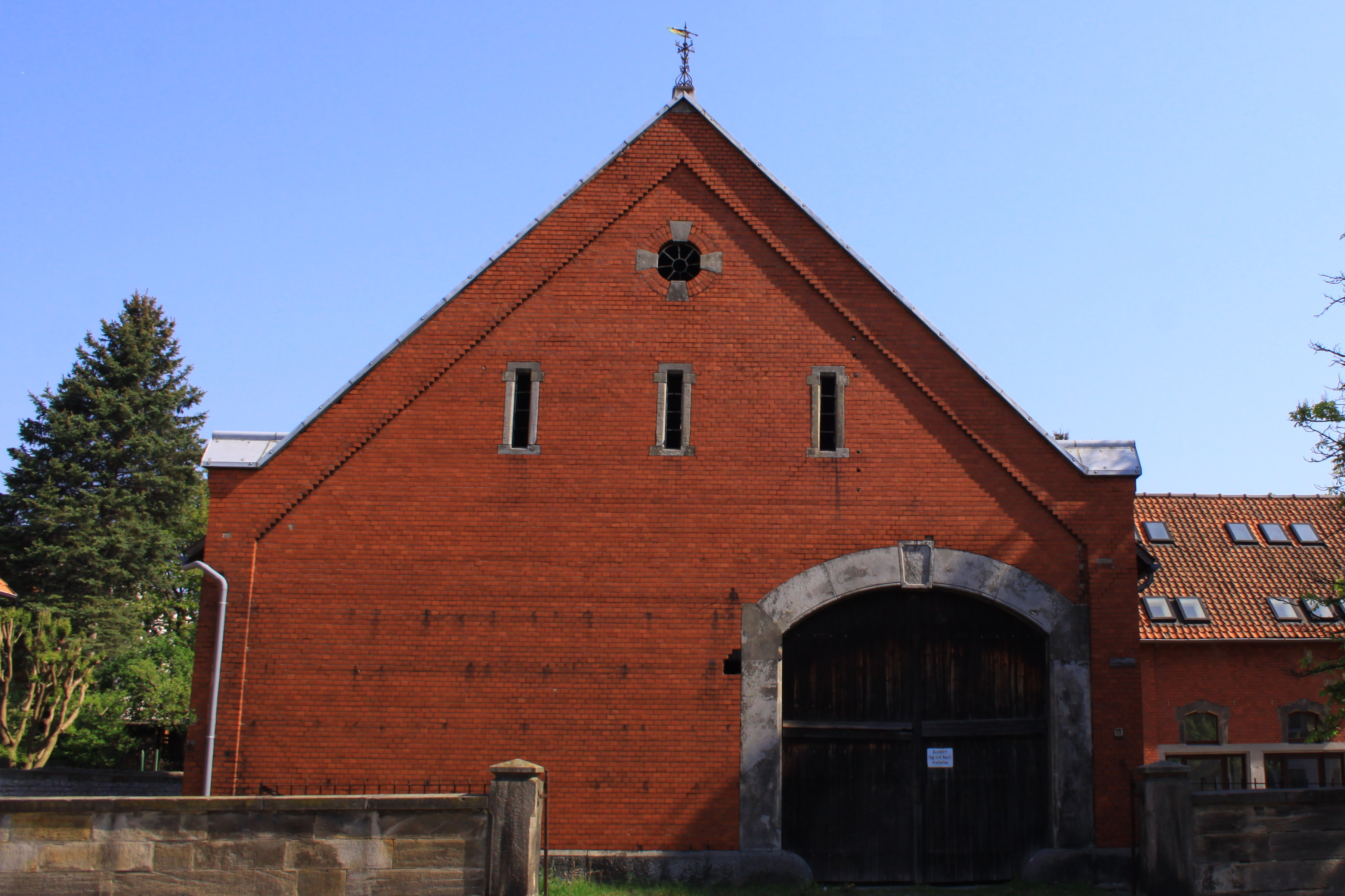 Mensing`sche Scheune in Wennigsen Bredenbeck Wennigster Str. 17